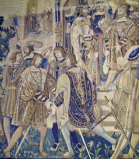 Tapisserie représentant François 1er roi de France l'hôtel de Cluny Paris musée national du Moyen age